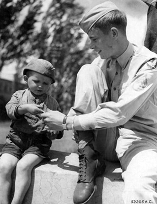 Frantik_poltava.jpeg: Полтава. 1944 рік. Солдат ВПС США і українських хлопчик